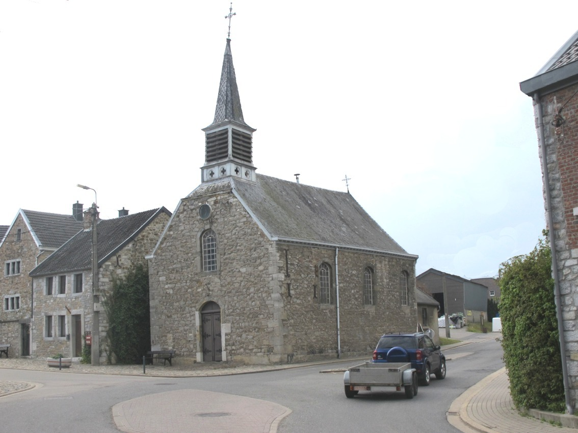 Chapelle de Hèvremont, Limbourg, Belgique